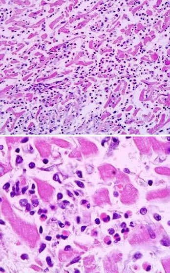 Myocarditis viralis